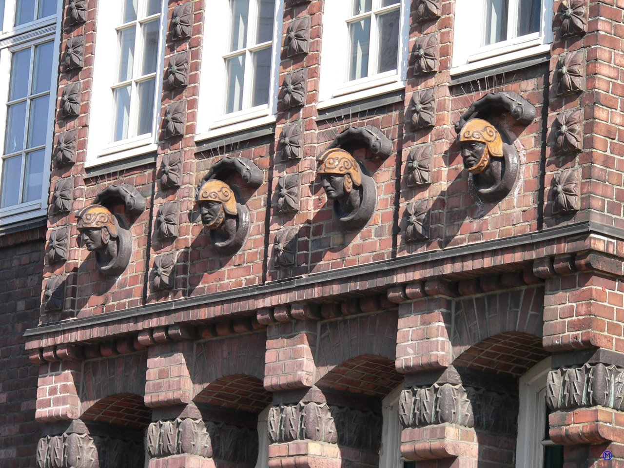 Fassaden-Details von Richard Kuöhl an der Davidwache Hamburg